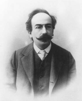 Karel Vejrych (1873-1930)